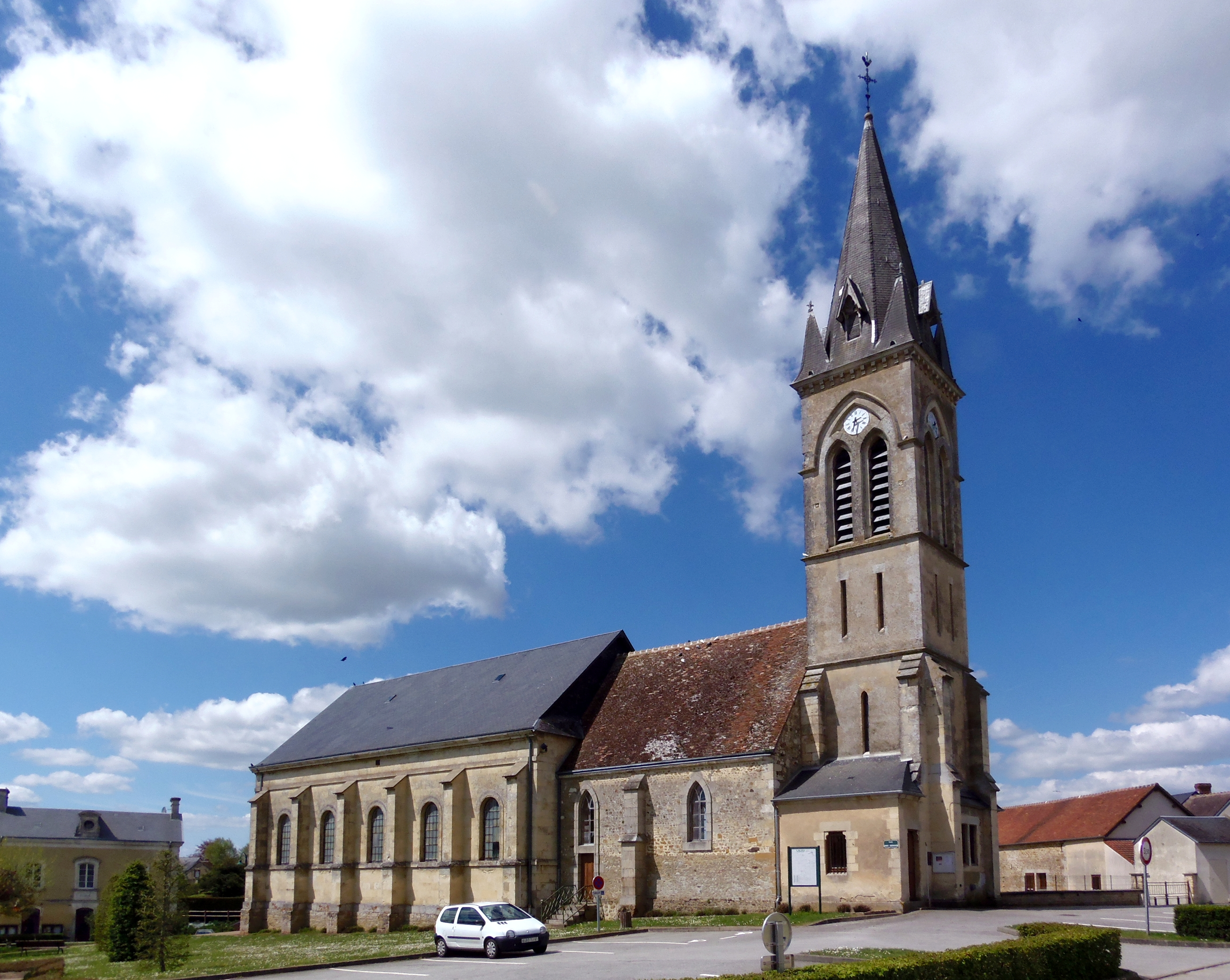 Laleu (Normandie, France). L'église Saint-Germain.